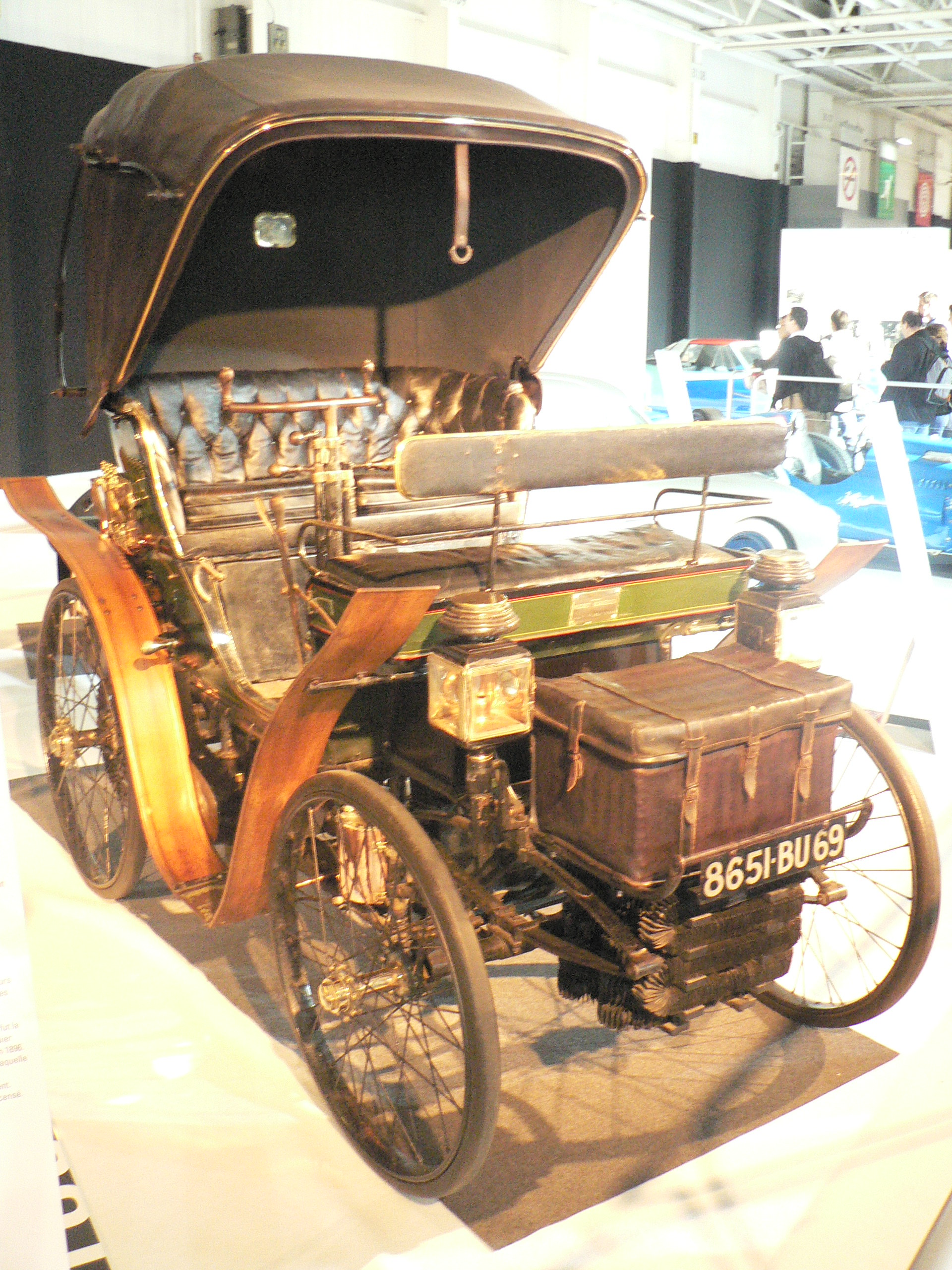 Mondial de l automobile de Paris (October 2006)